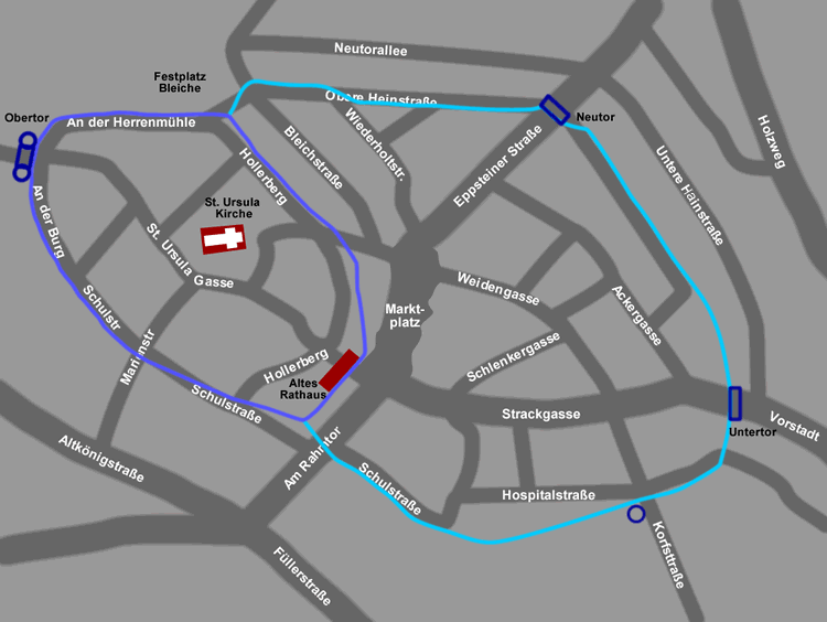 Stadtplan von Oberursel (Innenstadt). In Blau sind die historischen Stadtmauern eingezeichnet (dunkel: 1446, hell: 1481) mit den dazugehörigen Toren. Der Verlauf und die Namen der Straßen entsprechen der Gegenwart, daher kommt es zu Überschneidungen zwischen Mauer und Straße. Zur besseren Orientierung sind noch die St.-Ursula-Kirche und das historische Rathaus eingezeichnet.